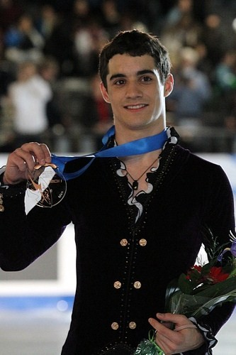 Хавьер Фернандес с первой в истории испанской медалью финала Гран-при по фигурному катанию (бронза).